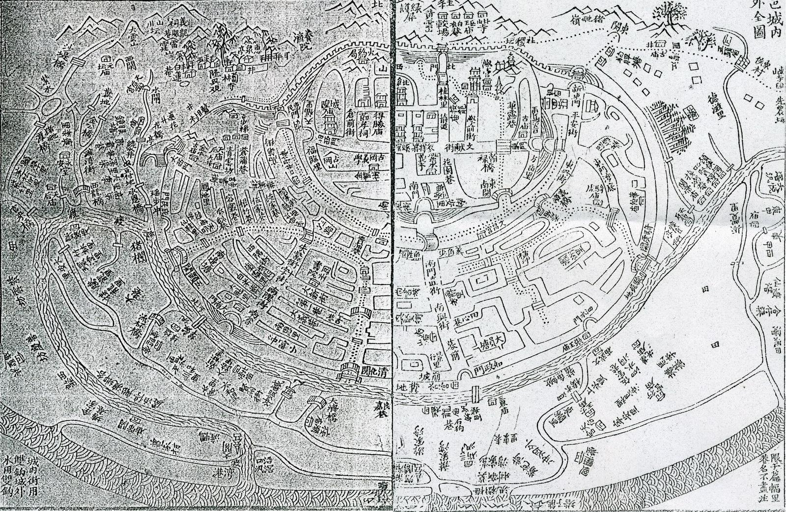 1840年新会城地图